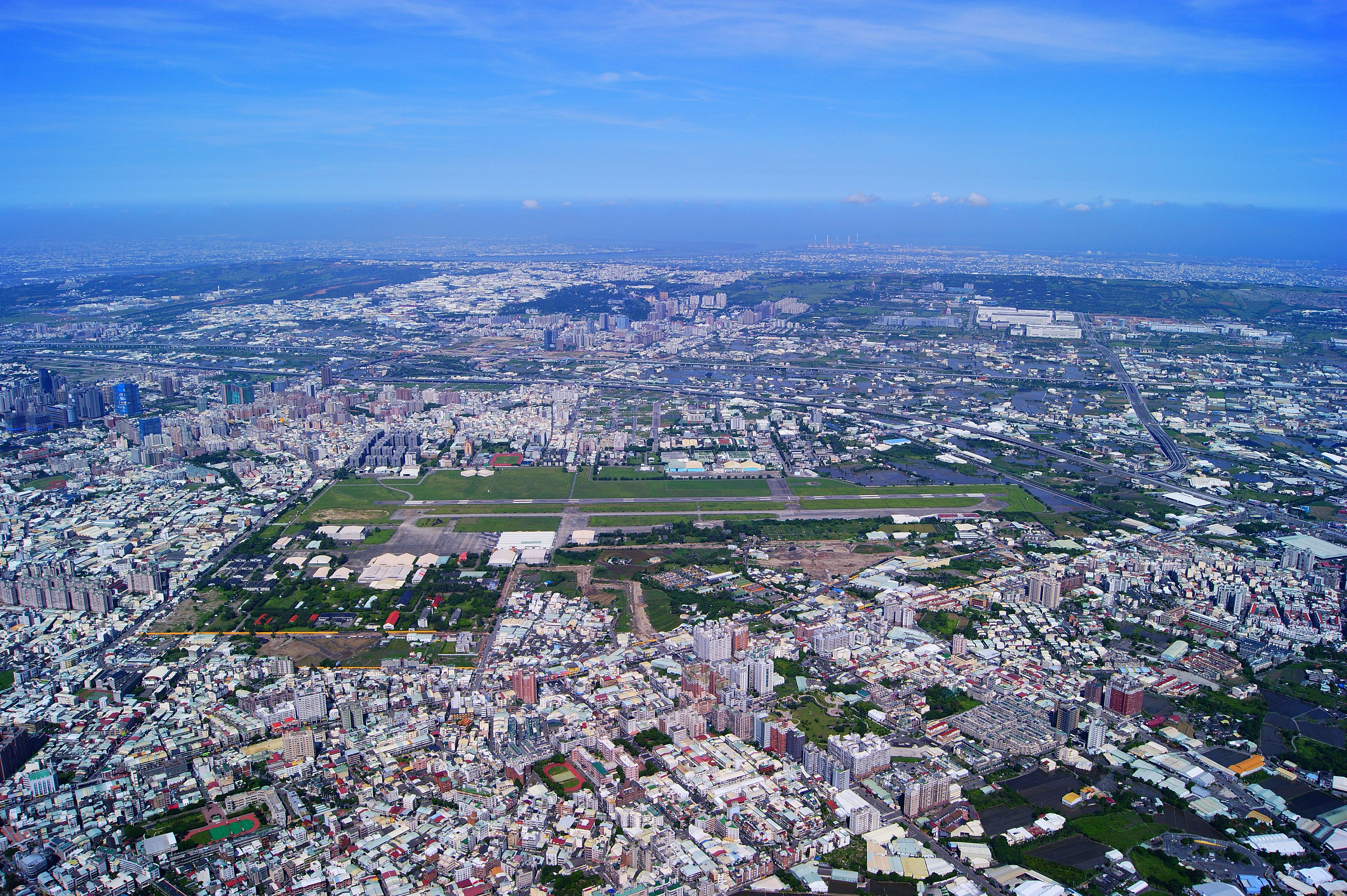 中文（台灣）: 水湳經貿園區空中拍攝圖。